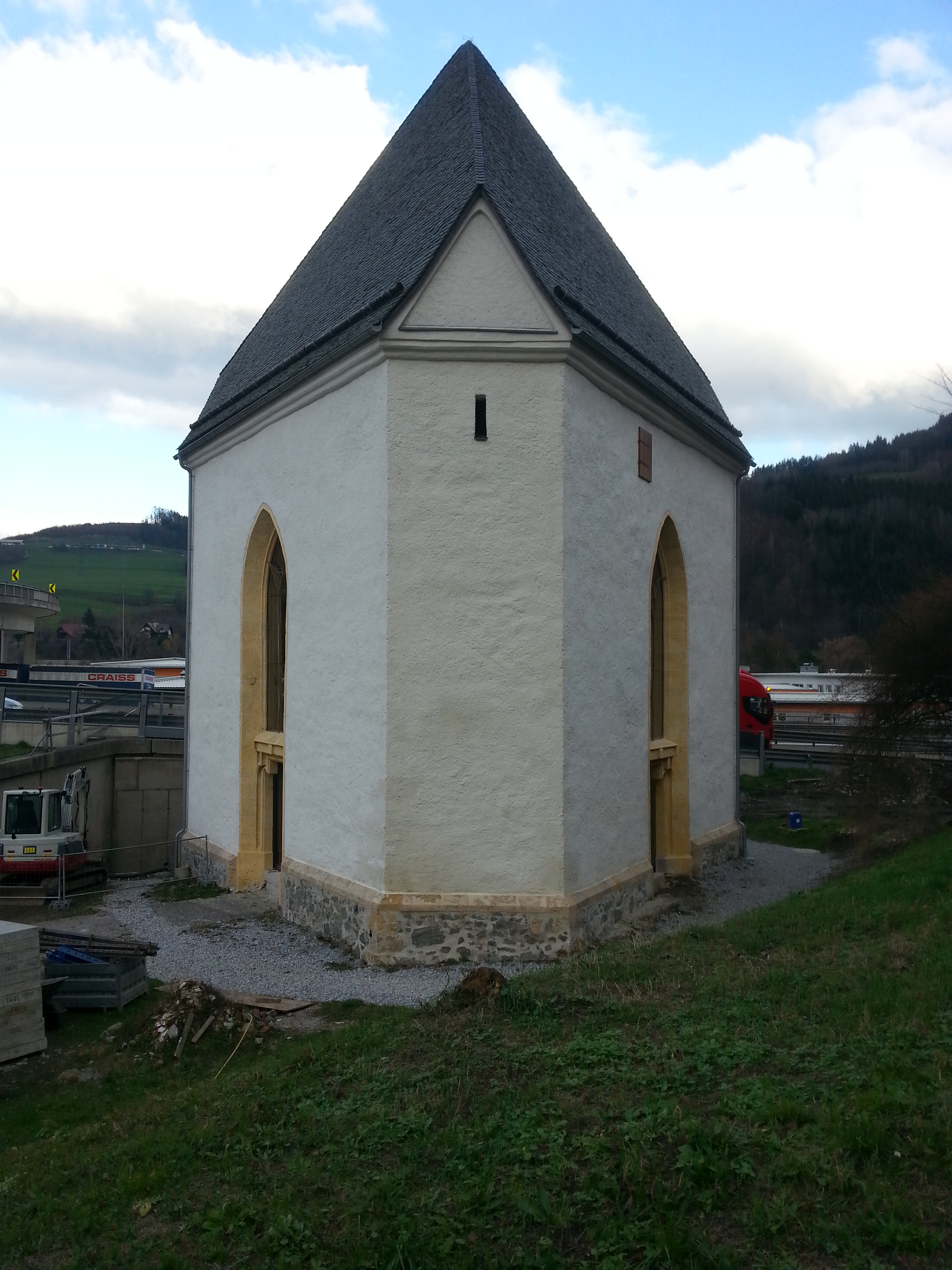 Heilig-Geist-Kirche in Bruck an der Mur (A), nach der Sanierung 2018.